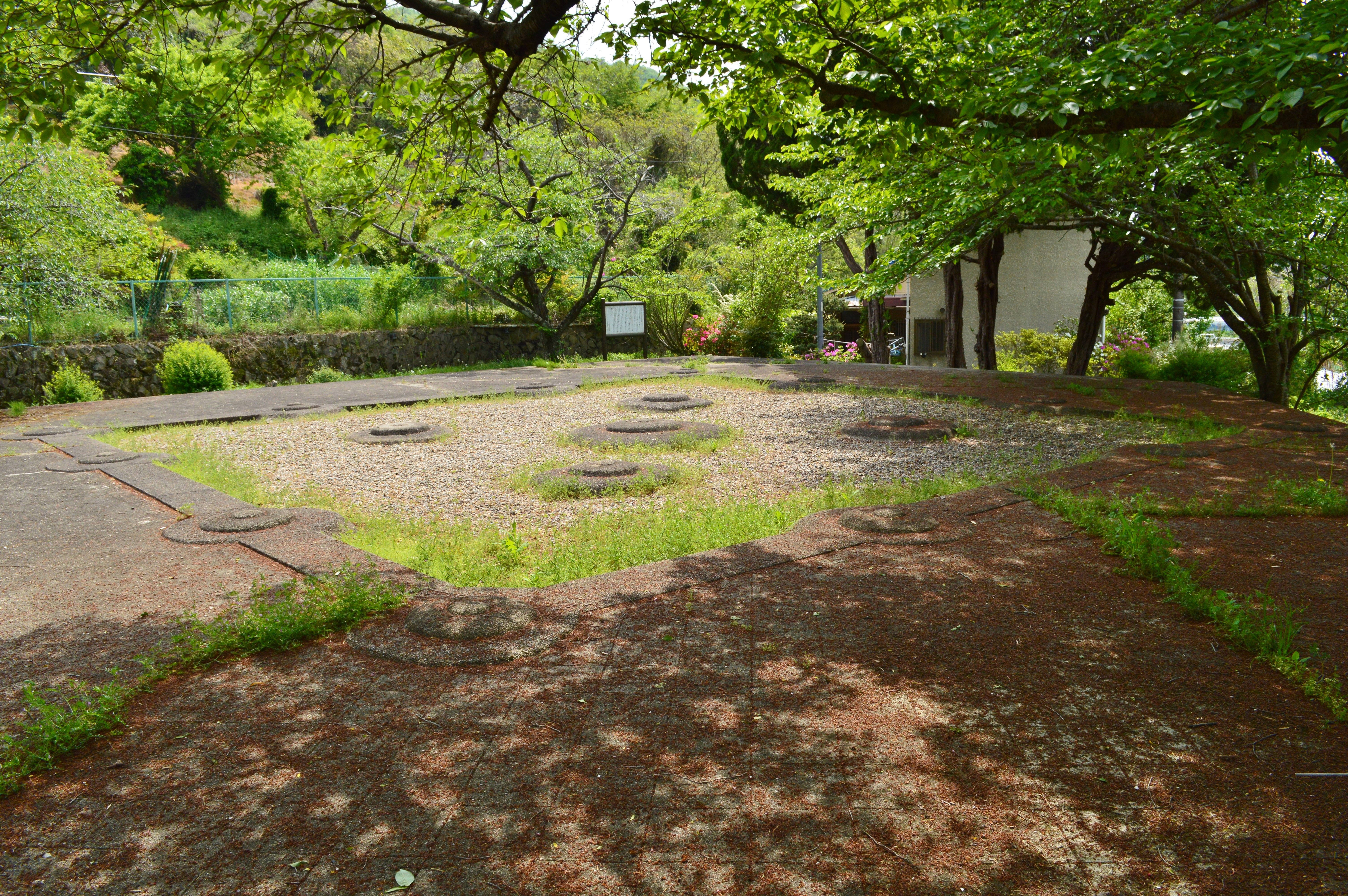 河内国分寺跡 塔基壇上面